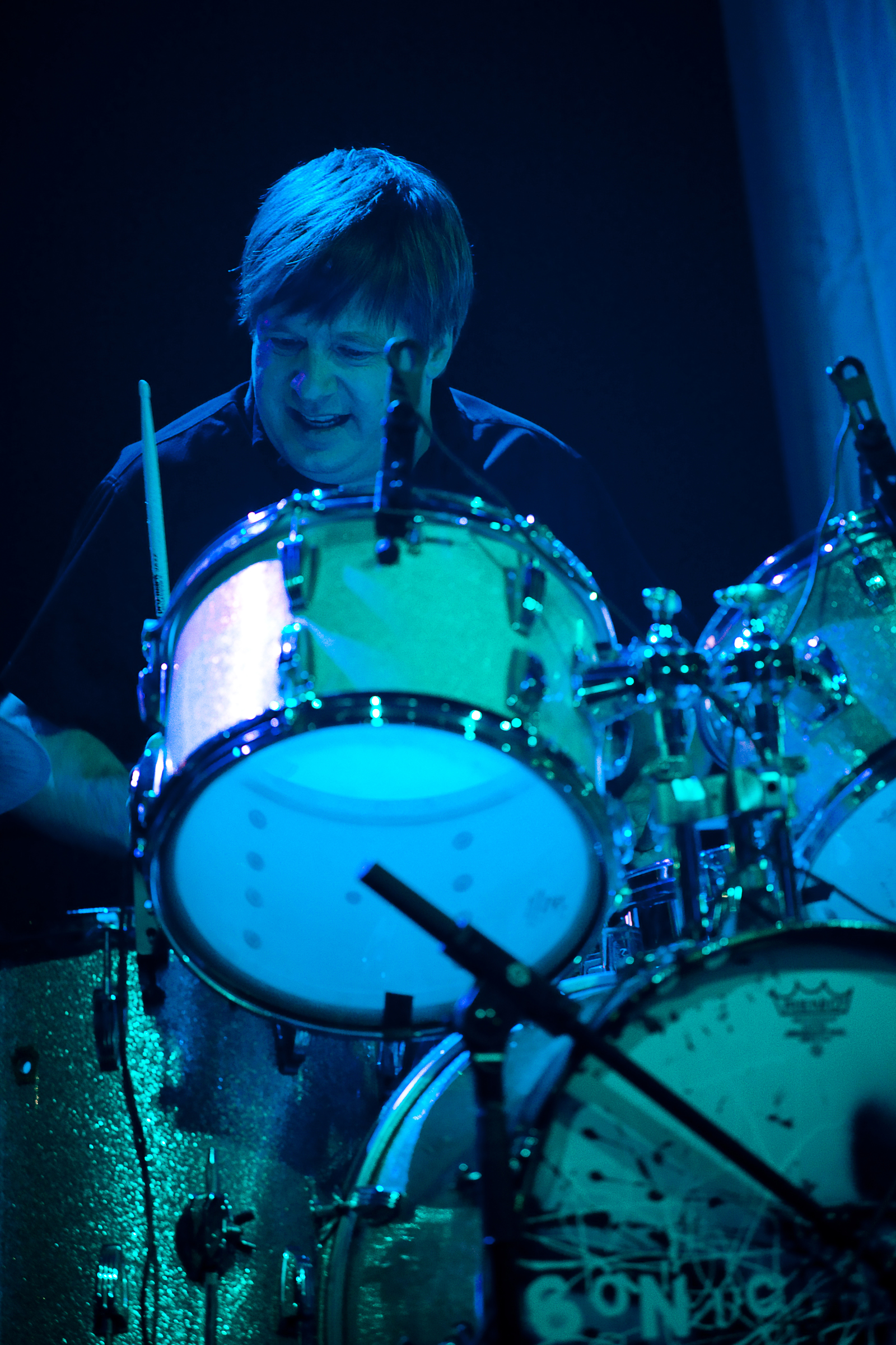 Sonic Youth - Razzmatazz 2010